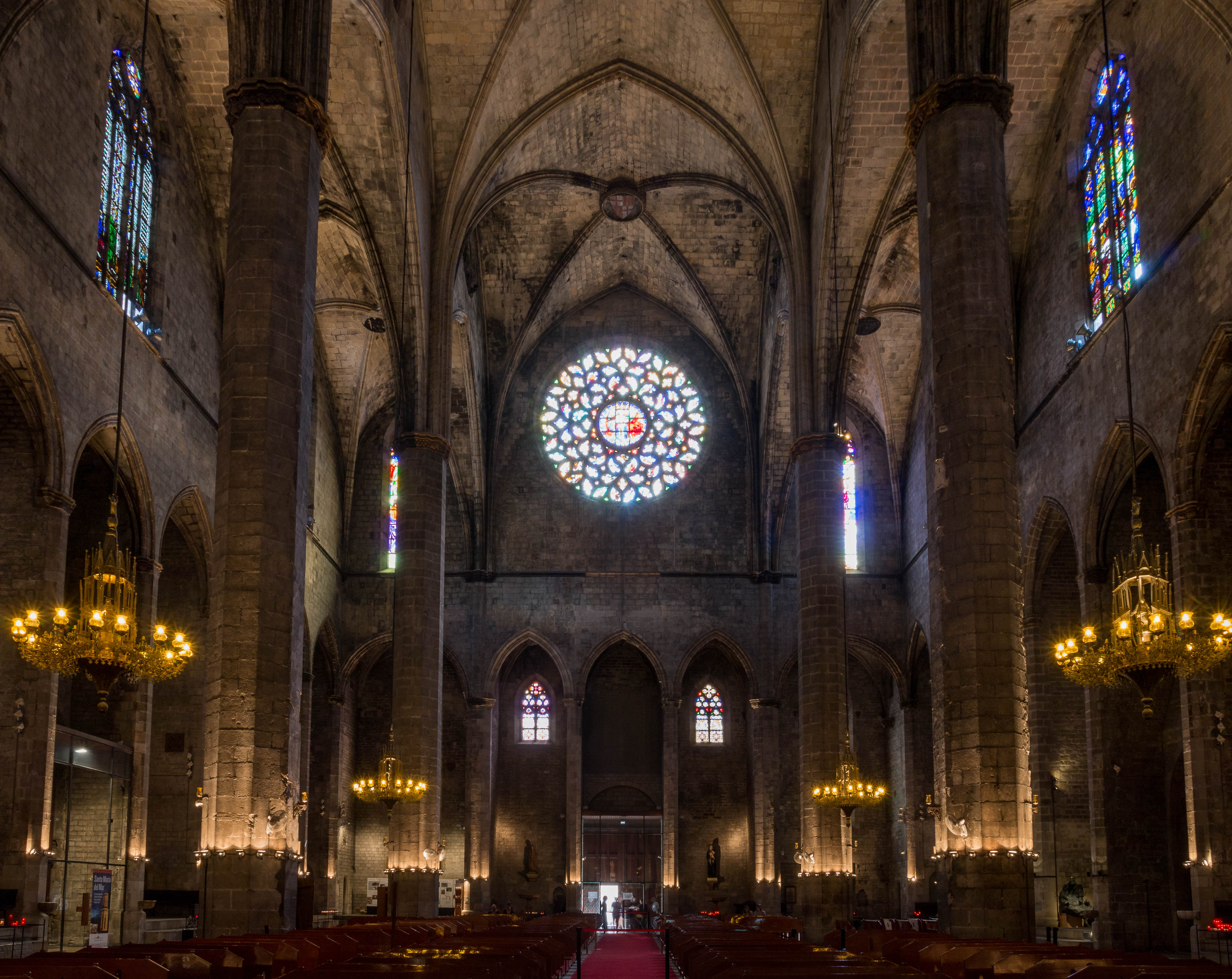 Langhaus der Santa Maria del Mar